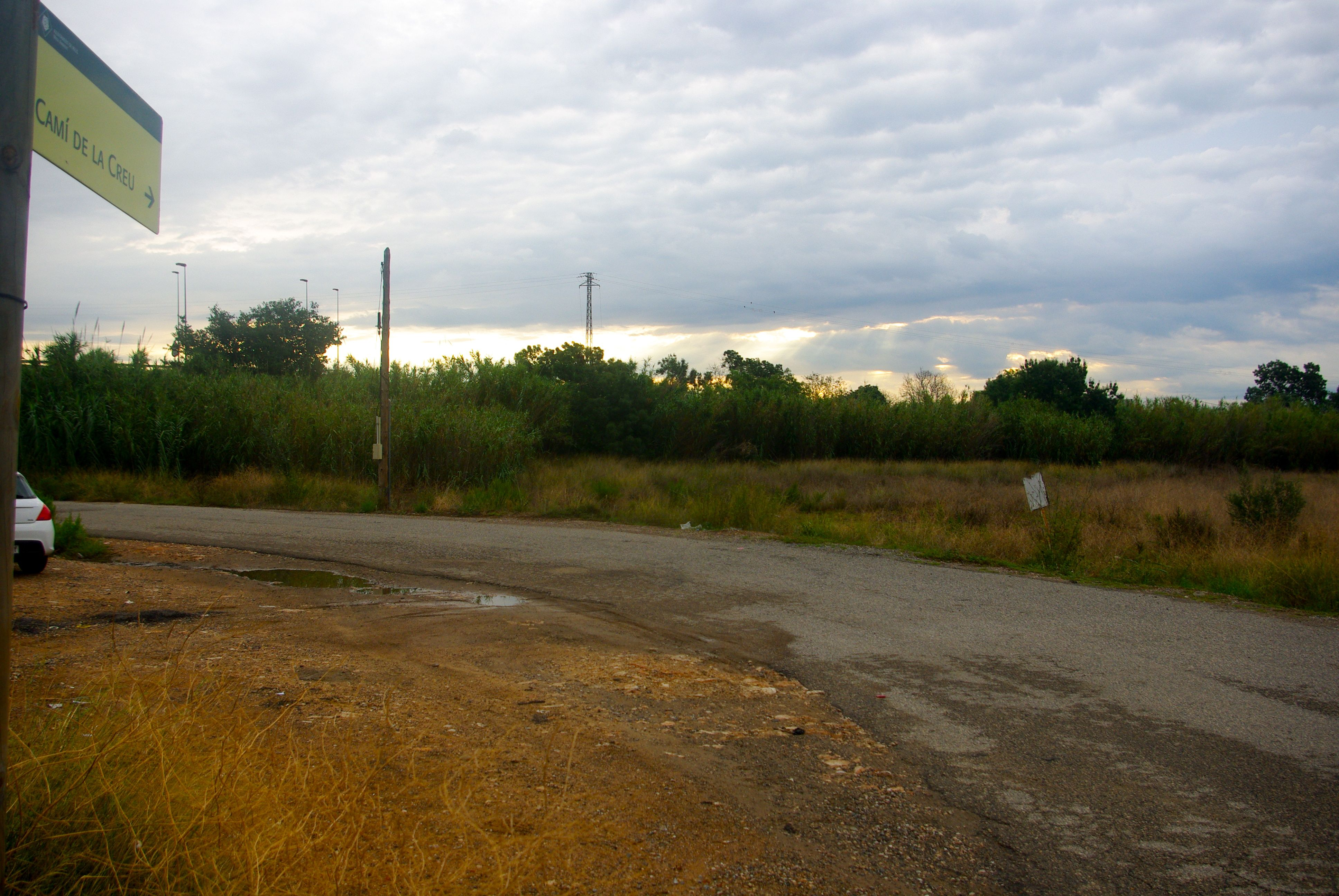 Camí de la Creu on hi havia l'antiga Creu de Ferro, al terme de Reus